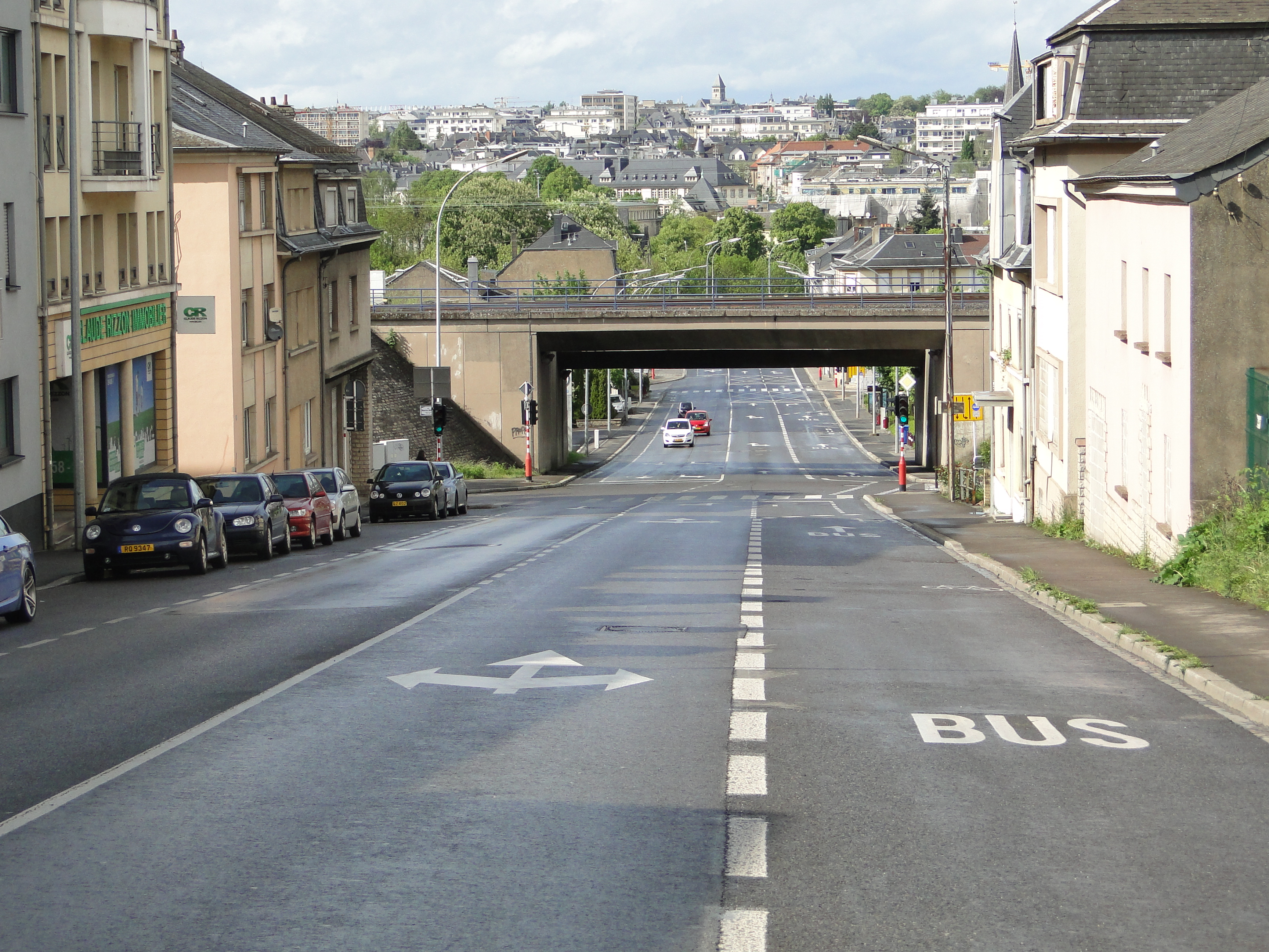 Gasperich - am Gaasperecherbierg, a Richtung Hollerech gekuckt